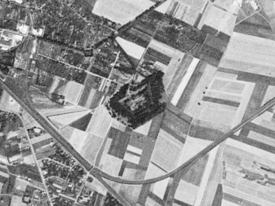 Fort Ia Twierdzy Poznań sfotografowany przez satelitę KH-4A 1023, 23 sierpnia 1965 r.